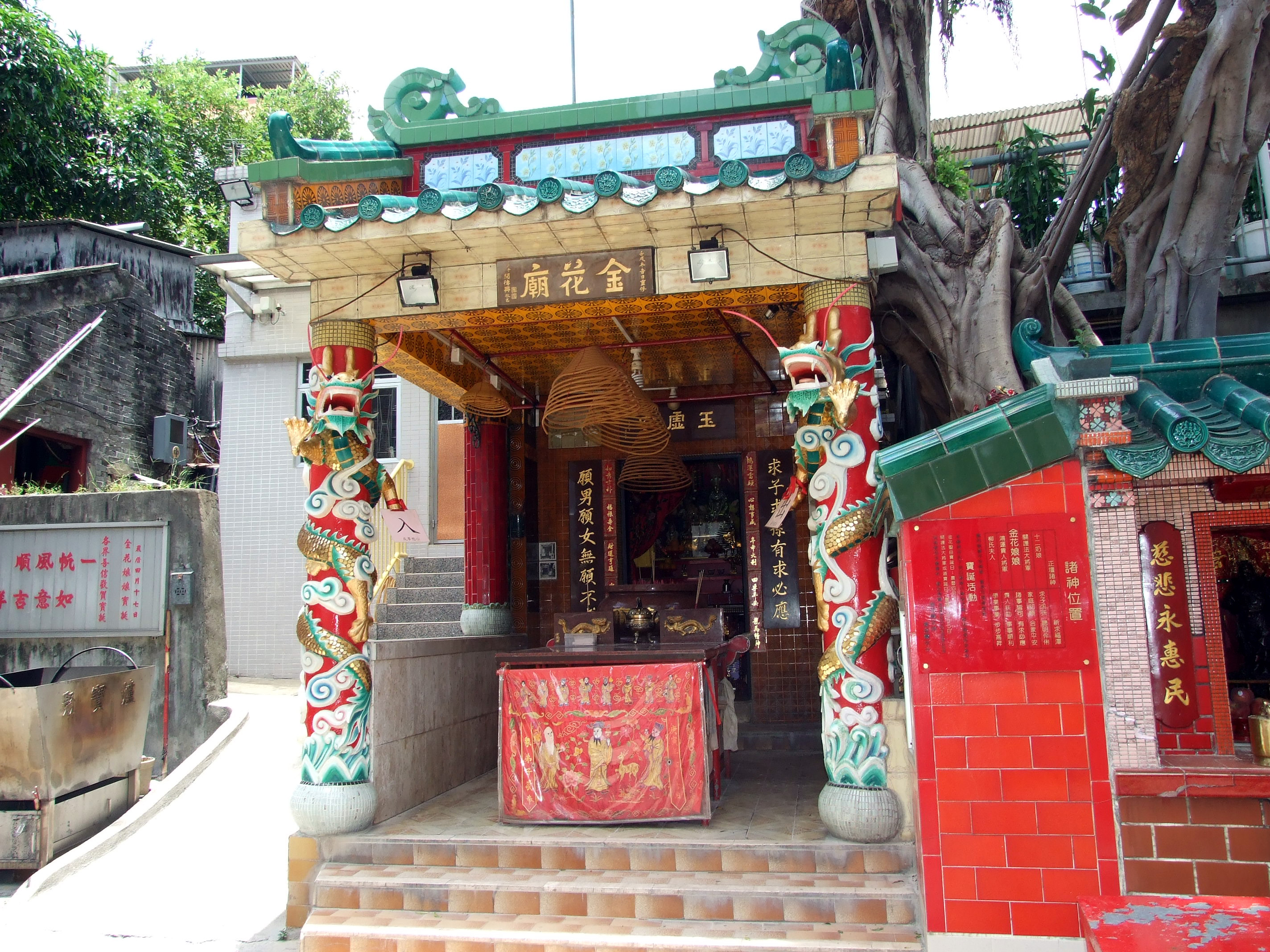 中文（香港）: 坪洲金花廟